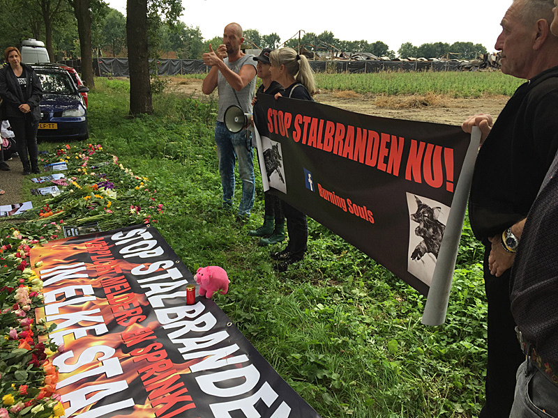 Herinneringsevenement stalbrand